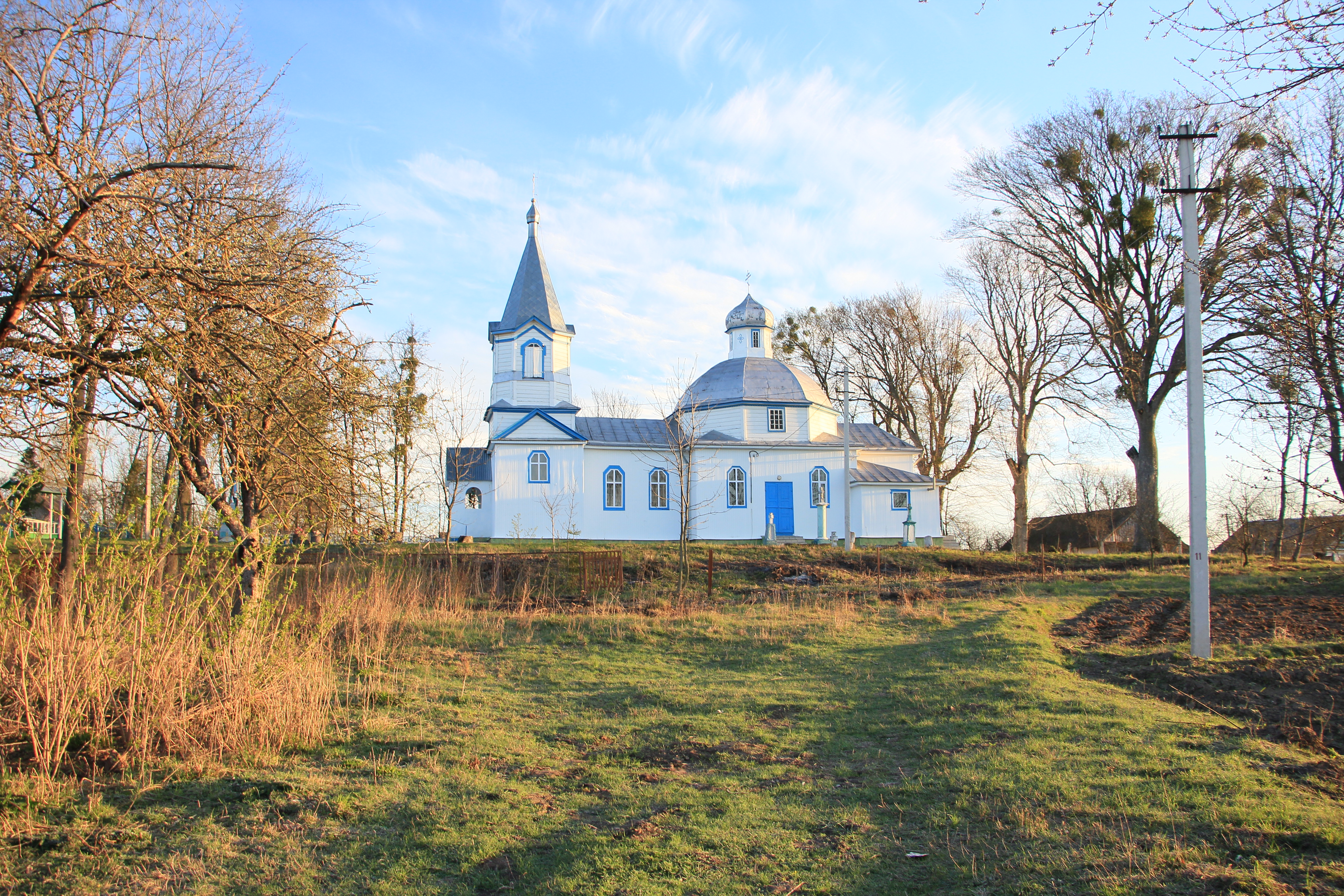 Дерев'яна церква в селі Малі Дедеркали Шумського району Тернопільської області